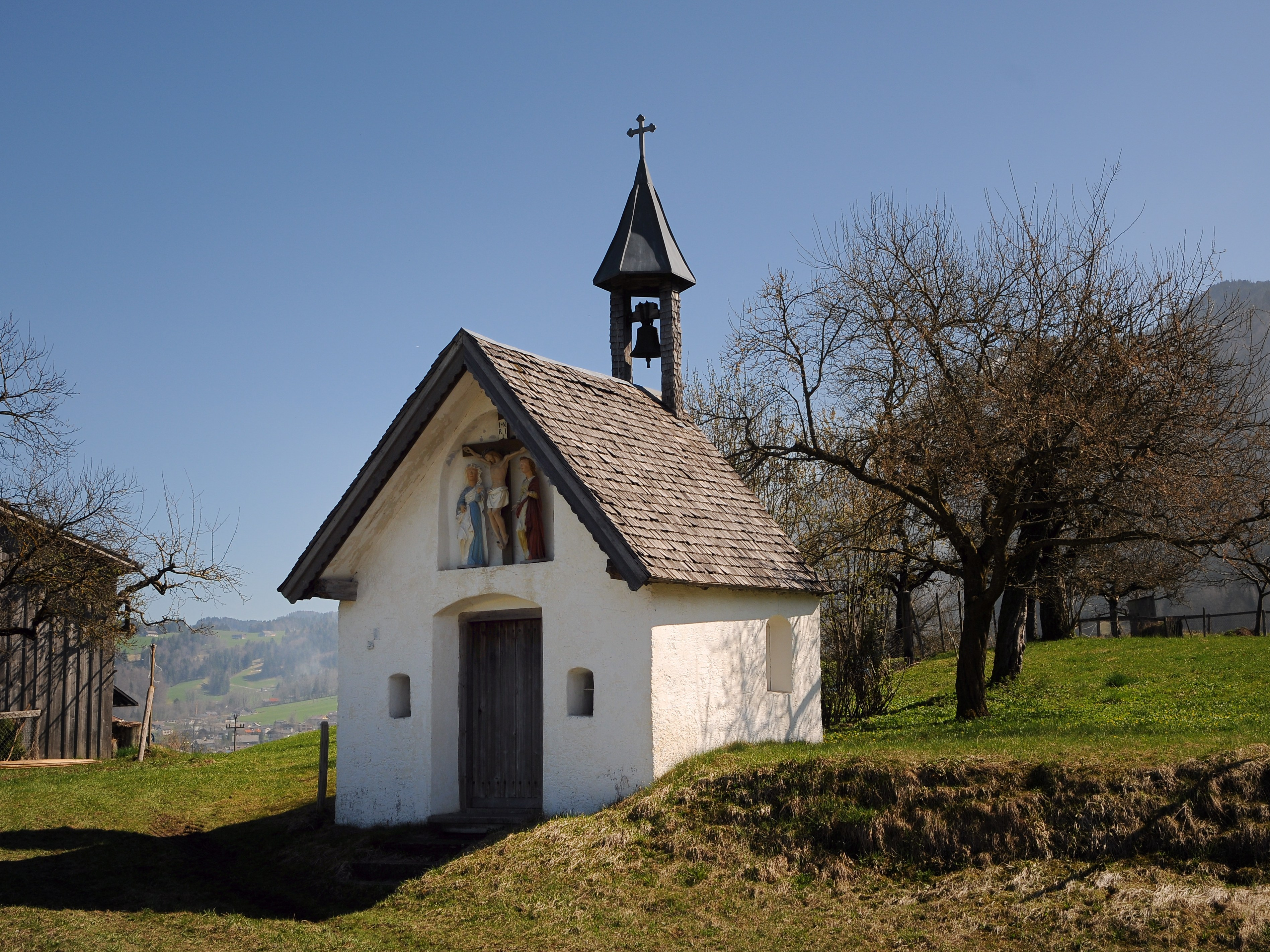 aus dem DEHIO Vorarlberg 1983: Kapelle hl. Sebastian, in Bühel (Andelsbuch). Kleine schlichte Kapelle unmittelbar an der Bregenzerwaldstraße, mit Satteldach, polygonalem Schluß und Glockenstuhl an der Chorseite. Über der Eingangstür Kruzifix, 2. Hälfte 19. Jh. Holzaltärchen mit Giebel und Säulen aus dem 3. Viertel des 19. Jhs., in der Altarnische hl. Sebastian, 17. Jh. Bildwerke: Kruzifix 18 Jh.; Hll. Aloysius und Antonius, spätes 19. Jh.; Immaculata, spätes 19. Jh.